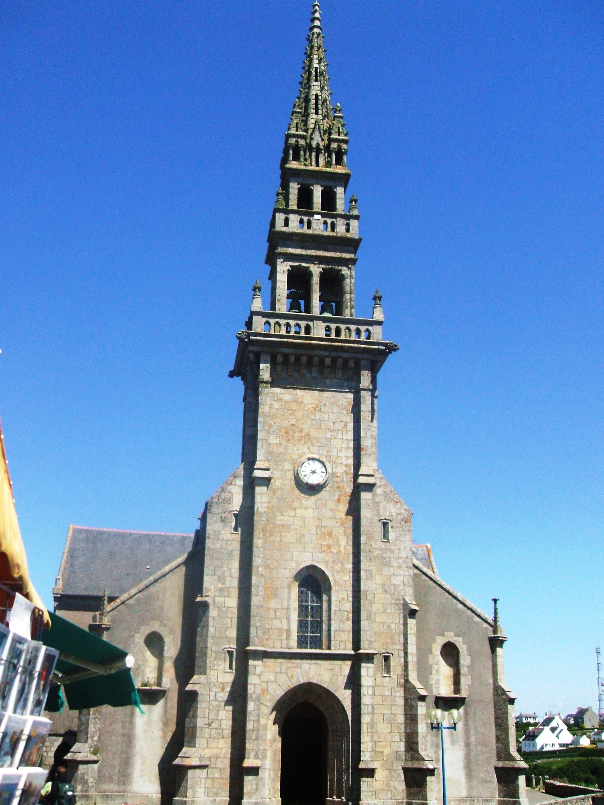 L'église Saint-Pol Aurélien sur l'île d'Ouessant